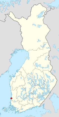 オルキルオト原子力発電所の地図をWikipedia英語版より取得。